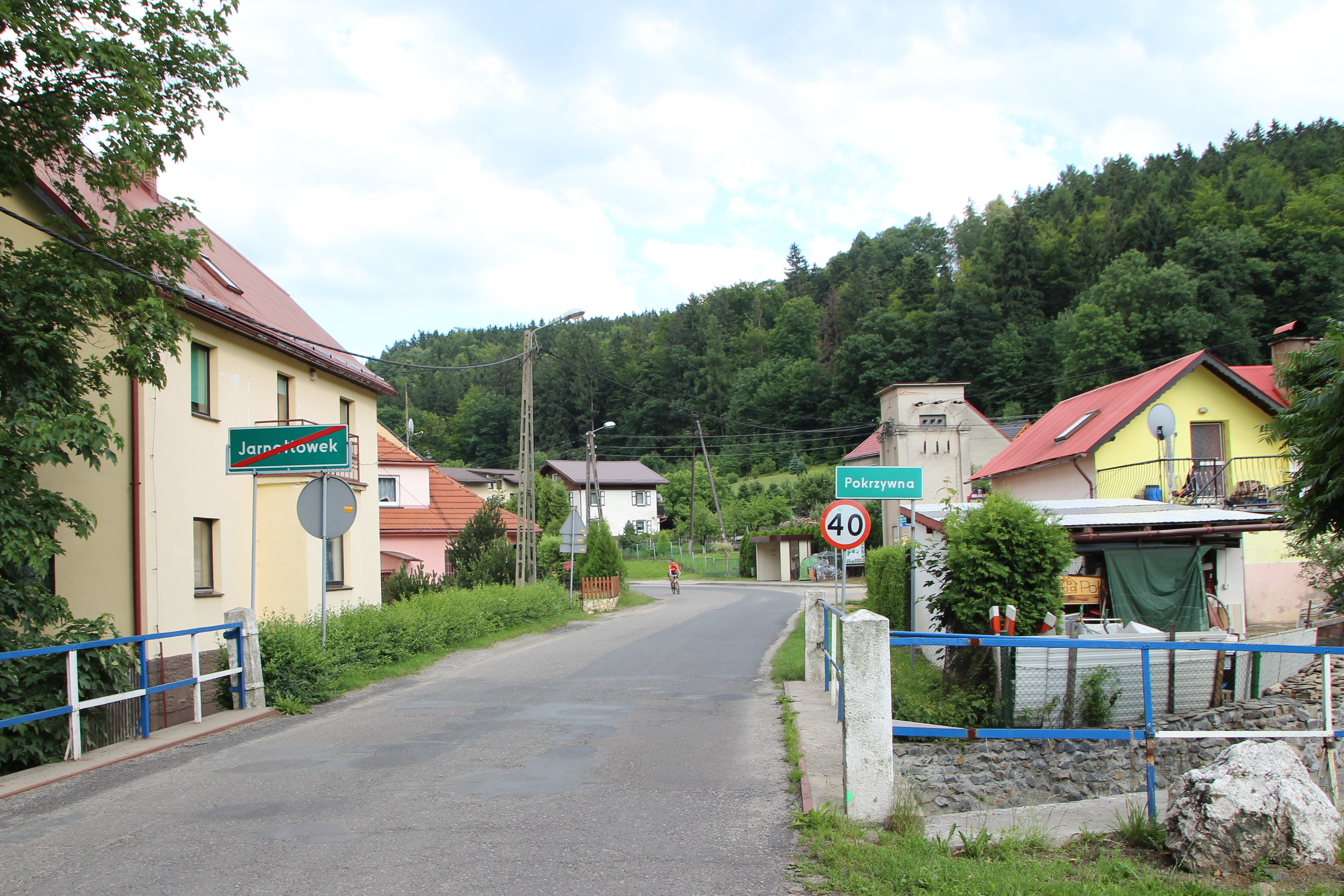 Wjazd do Pokrzywnej - wieś w Polsce w województwie opolskim, w powiecie nyskim w gminie Głuchołazy.